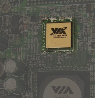 CPU VIA Eden-N